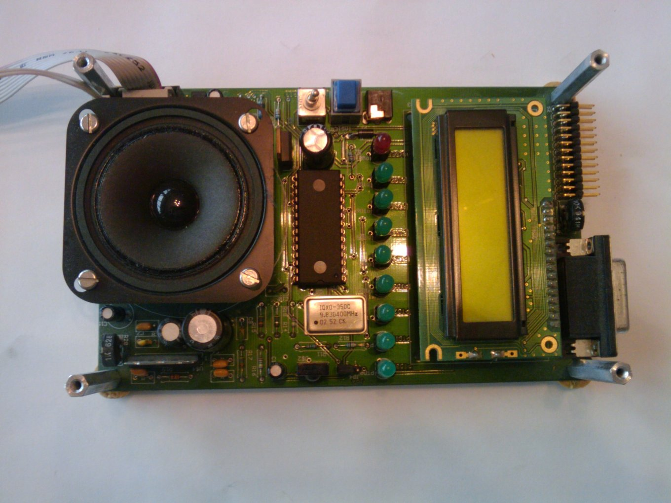 Evaluations-Board mit 68HC08JL-MCU